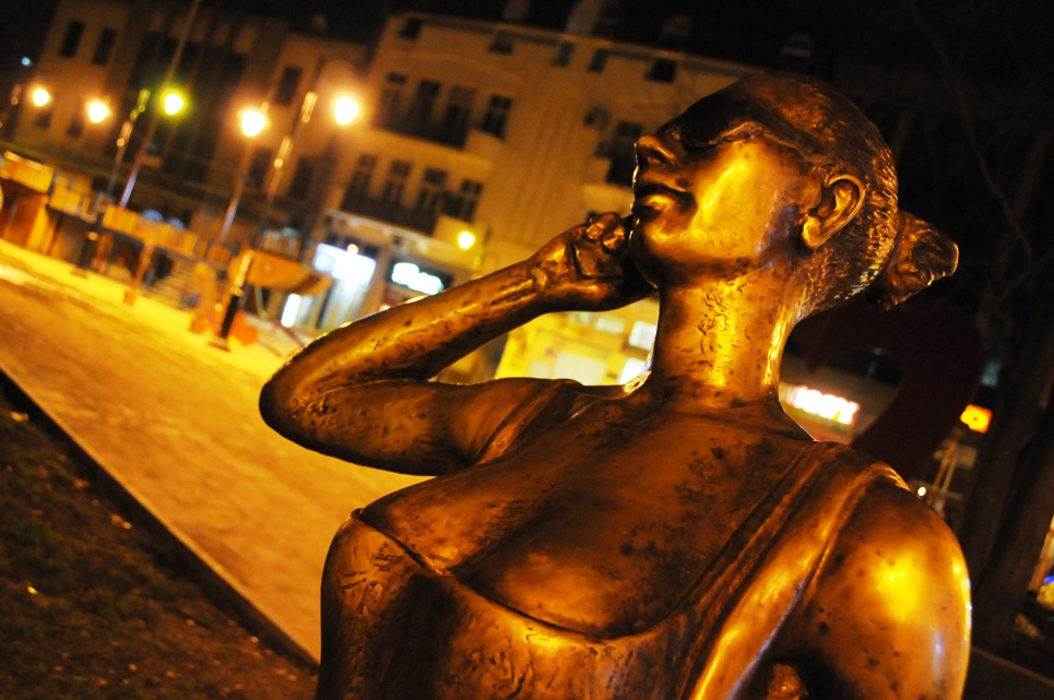 Shmizla monument, Skopje, Macedonia